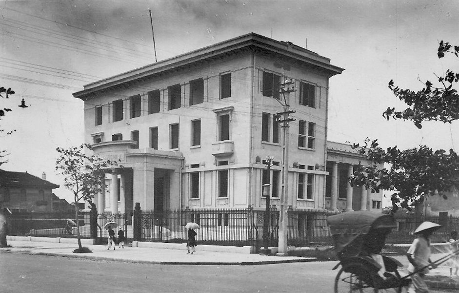 Ảnh chụp Ngân hàng Nhà nước ở thành phố Nam Định thời Pháp thuộc, tức giai đoạn cuối thời Nguyễn.